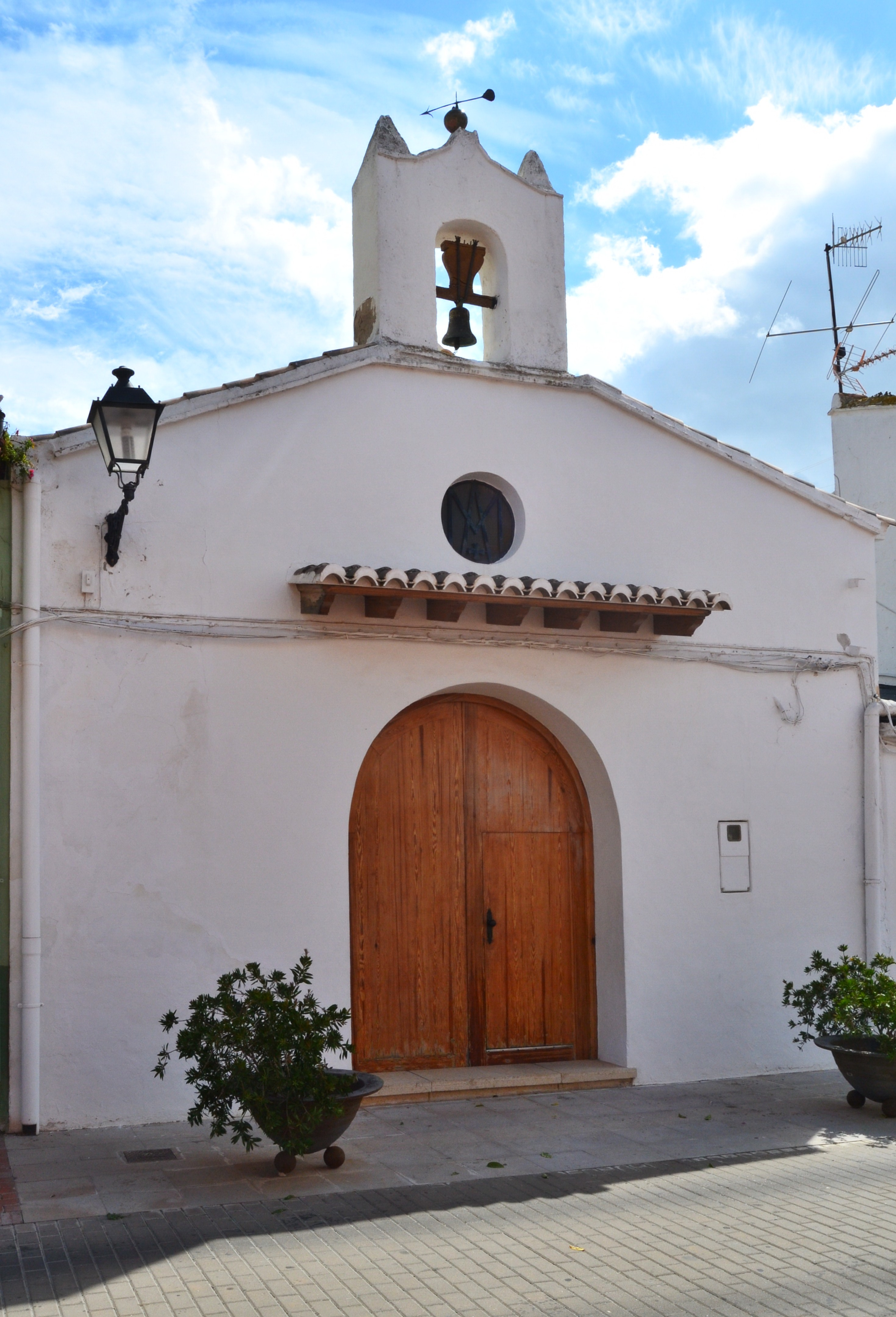 Església de sant Joan Baptista de Guardamar de la Safor. 25.140-001.